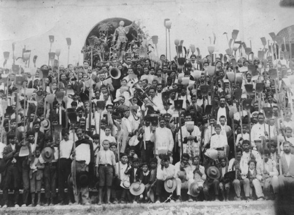 Fiesta de San Isidro, en Gramalote , Norte de Santander, en los años 40.